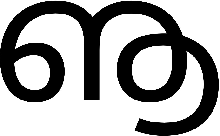 ൡ അക്ഷരം